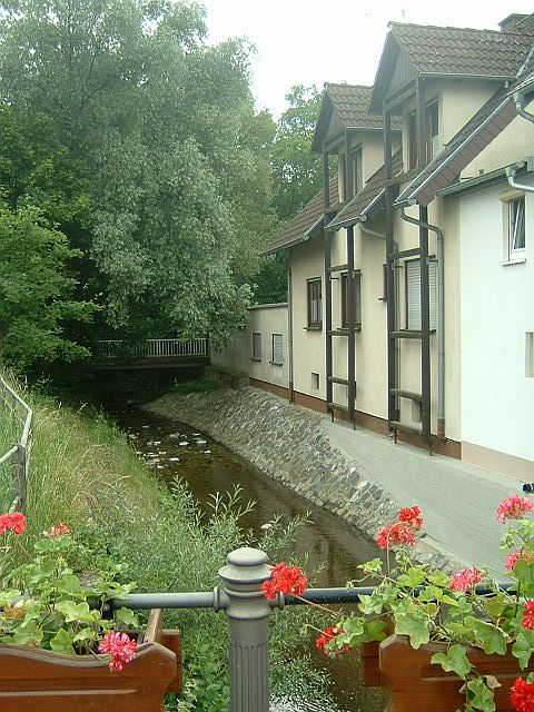 Der Braubach fließt teilweise auch durch Liederbach am Taunus. Die Aufnahme entstand auf der Brücke von der Hauptstraße. Selbst erstellt am 15.6. 2006 --Peng 10:38, 15 June 2006 (UTC)